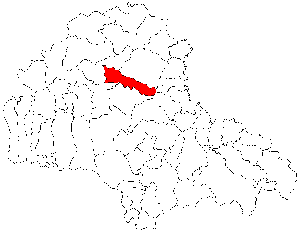 Categorie:Hărţi ale judeţului Braşov